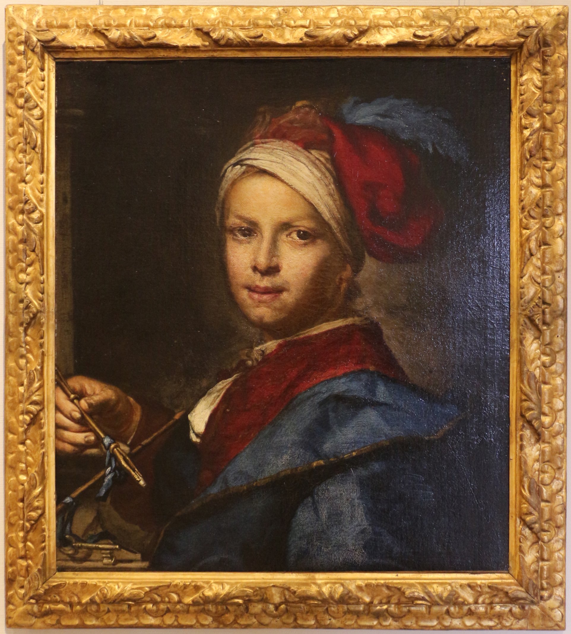 ritratto di giovane in veste di artistatitle QS:P1476,it:"ritratto di giovane in veste di artista" label QS:Lit,"ritratto di giovane in veste di artista"